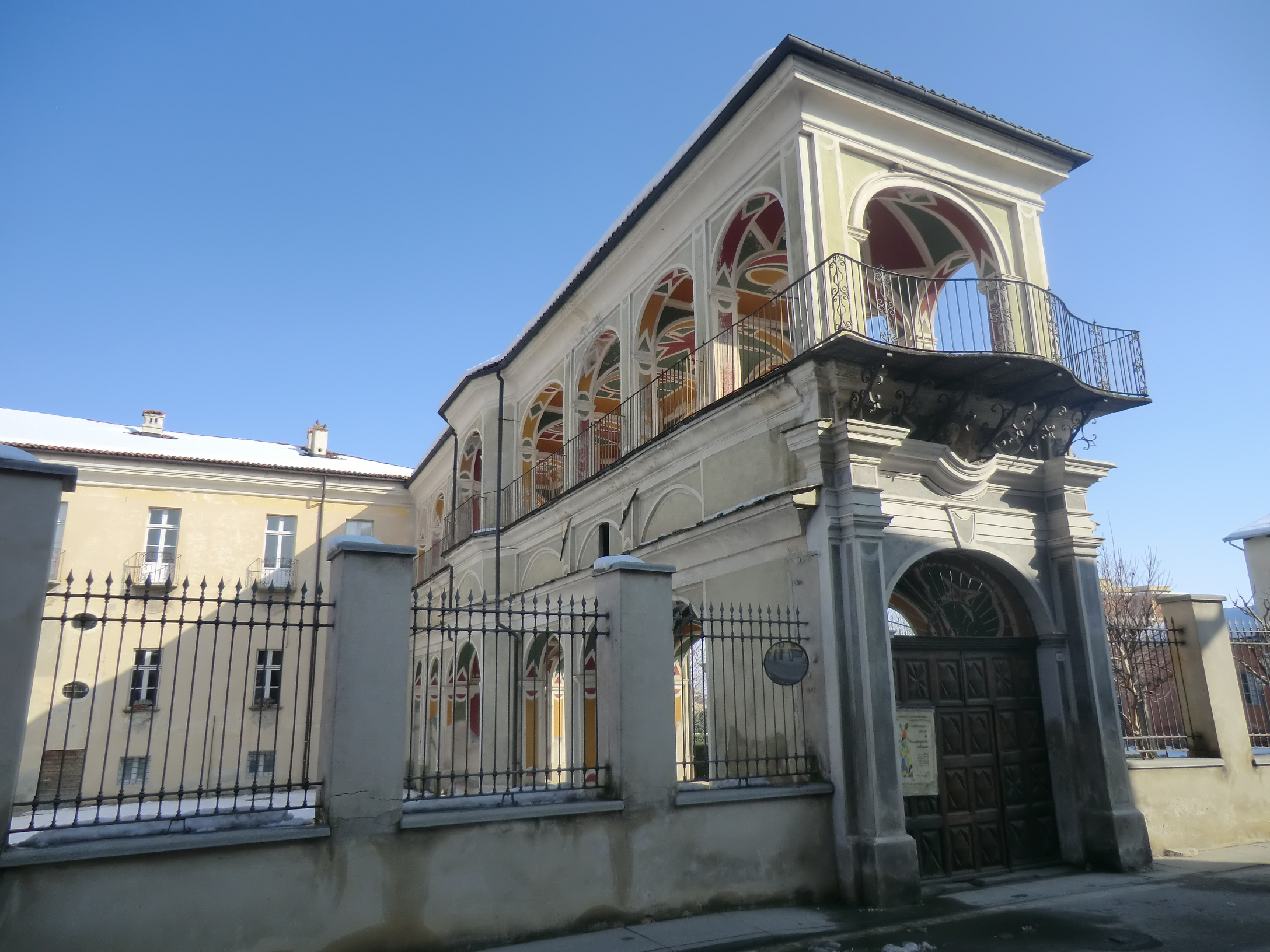 Costigliole Saluzzo (Cuneo): palazzo la Tour (XVIII sec.)